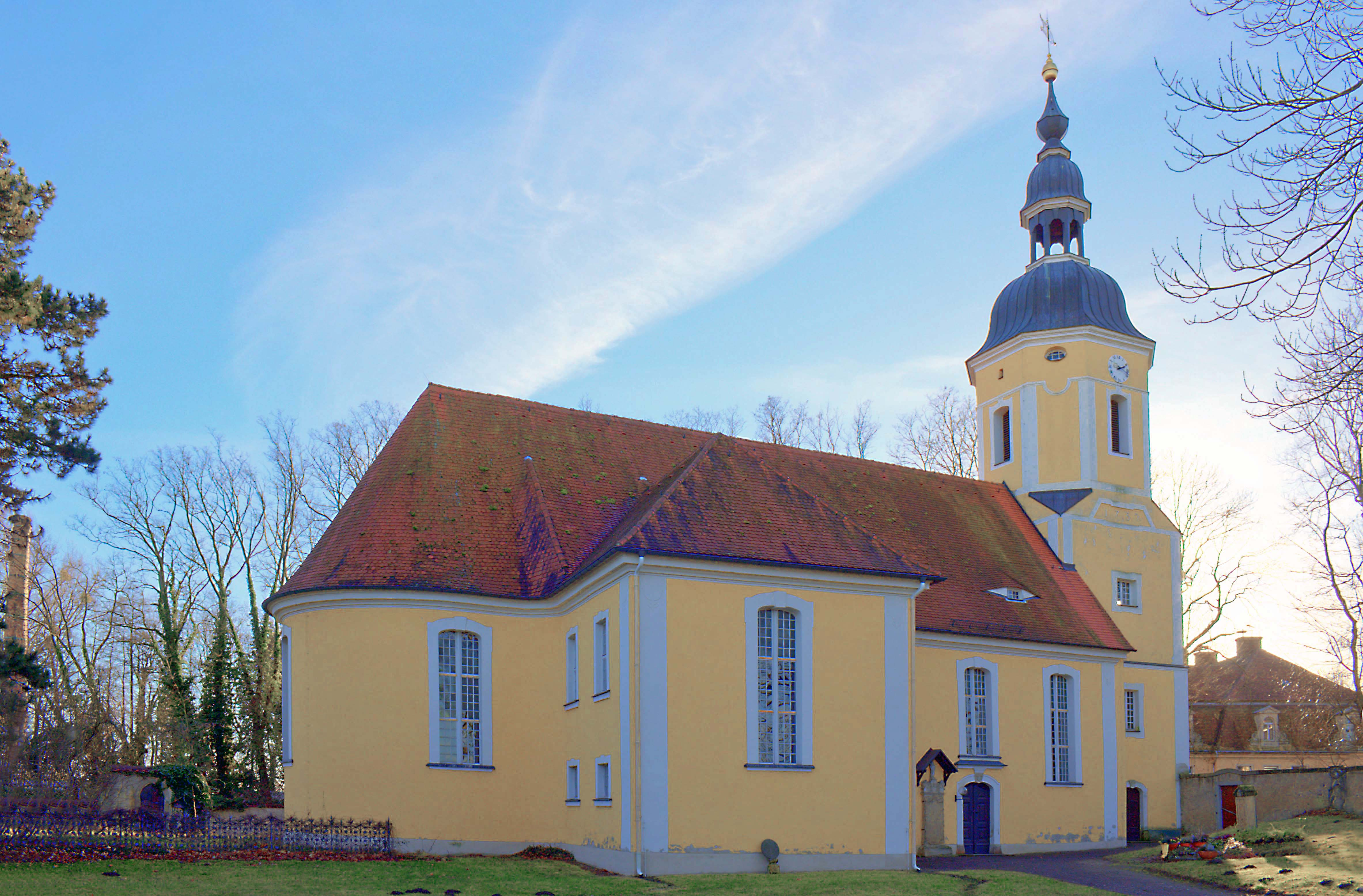 Kirche, Ernst-Thälmann-Platz 15 in Dalen Stt Börln